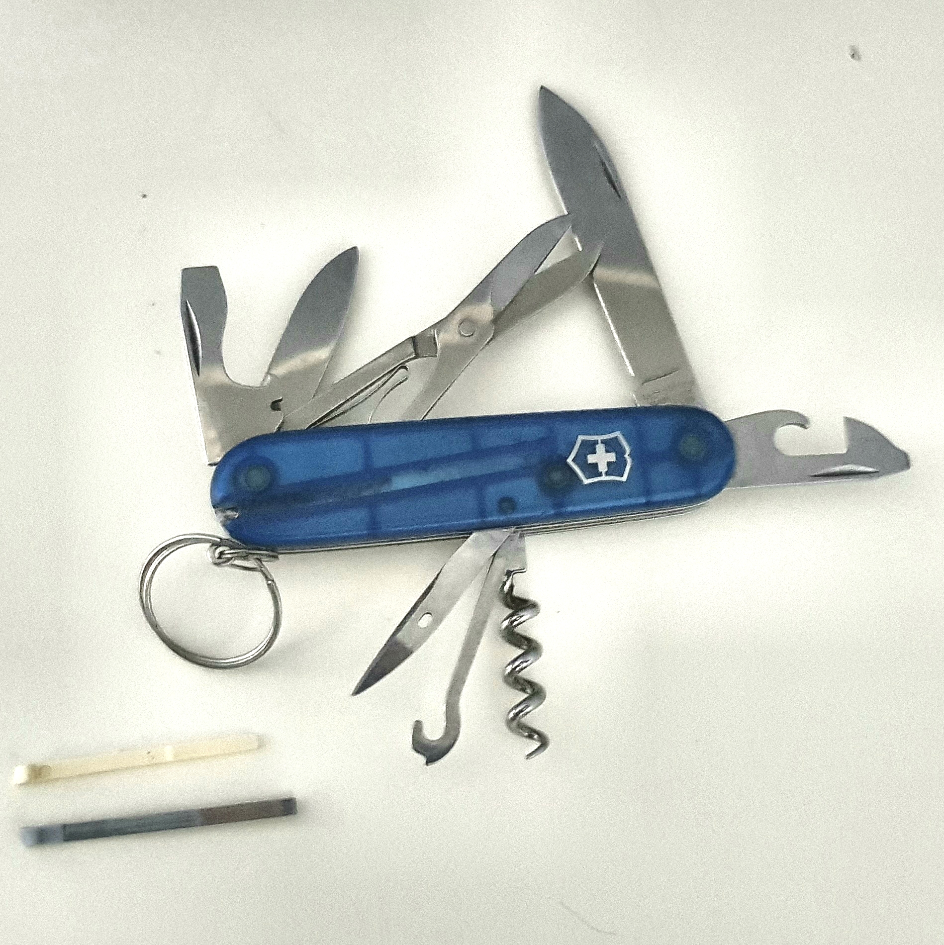 A photgraph of my swiss army knife:I photographed it myself.